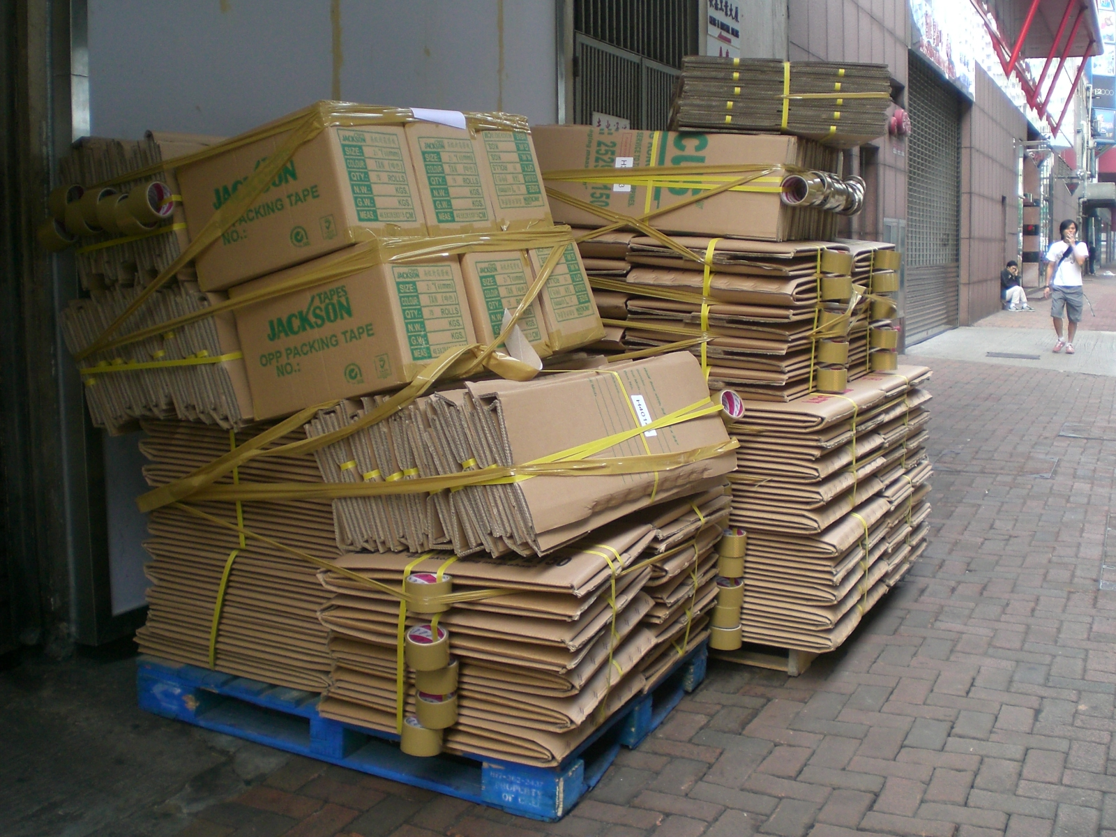 瓦通紙 又稱 瓦楞紙，香港俗稱紙皮，是紙質zh:包裝箱常見的用料，它比zh:木箱質輕，又有硬度，大小容易剪裁，保護被包裝的其他產品，不被損害。 Author:zh:User:KennethTom